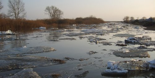 Разлив на реке Нижний Тогузак вблизи посёлка Солнце в Челябинской области